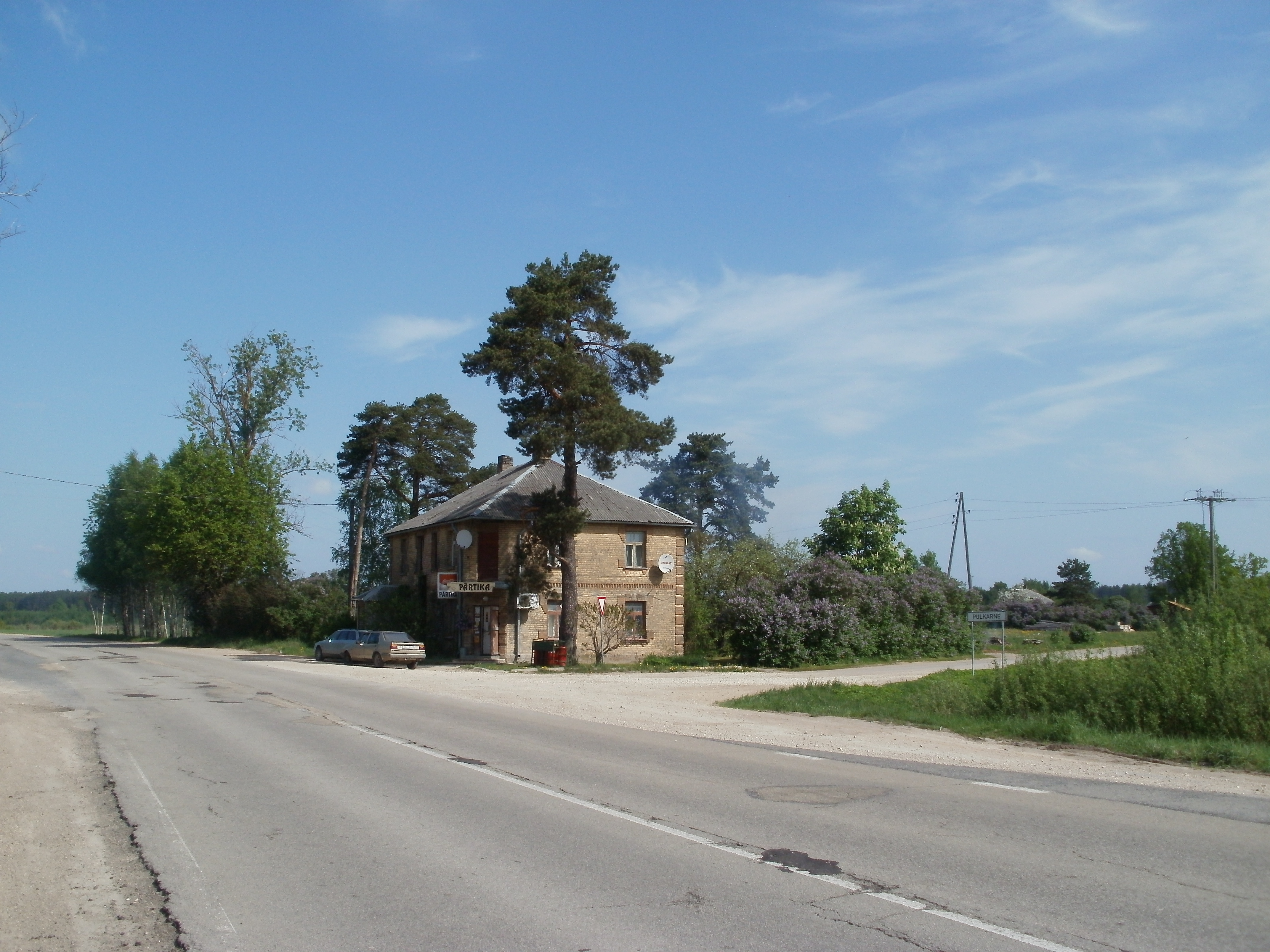 Veikals Pulkarnē